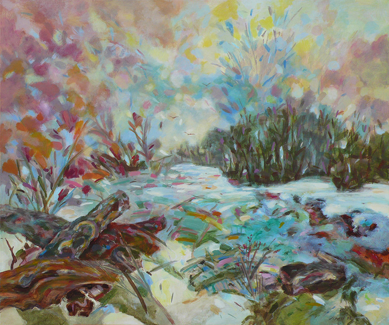 Gerald Sippel: "Jahreszeiten". 2011 Foto: Gerdi Sippel